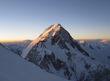 Gašherbrum I izpod Gašerbruma II